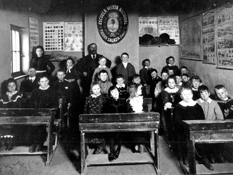 El maestro Owen Williams y sus alumnos en el aula de la Escuela Mixta Nacional de Tierra Salada (Tyr Halen) (hoy denominado 28 de Julio) que funcionaba en la vivienda de Owen Owens.